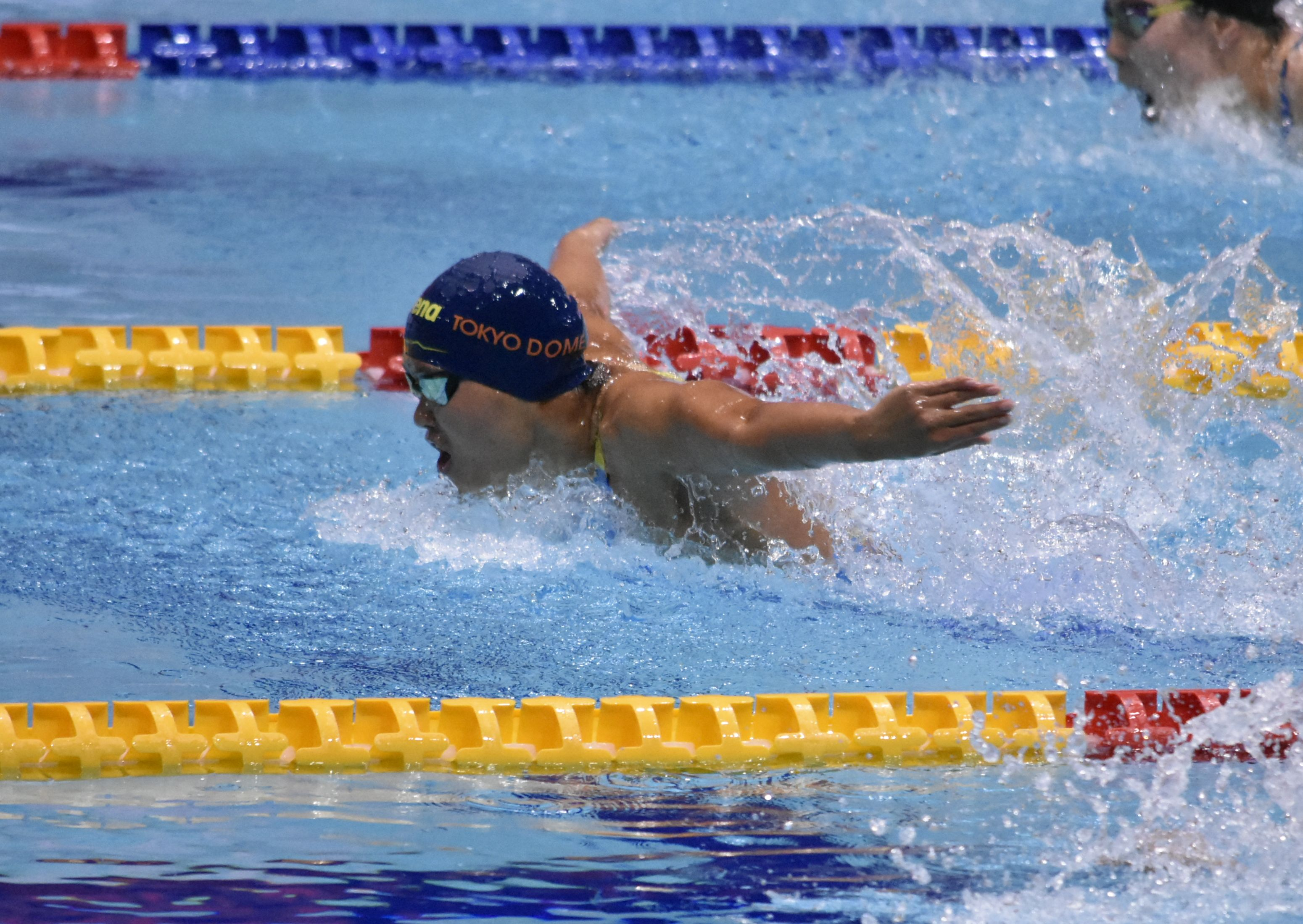 長谷川 涼香